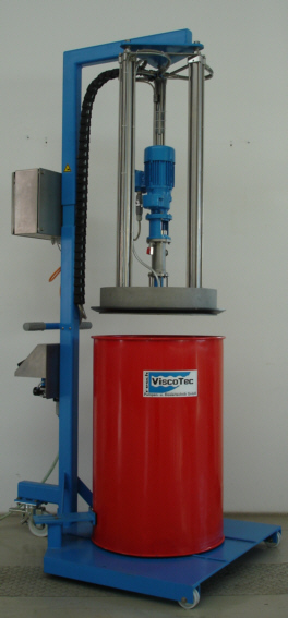 Fassentleerung